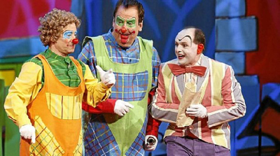 Txirri Mirri eta Txiribiton pailazoak